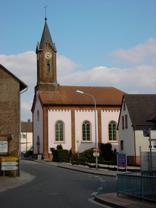 Motorradmuseum in der evangelischen Kirche in Otterbach, Pfalz